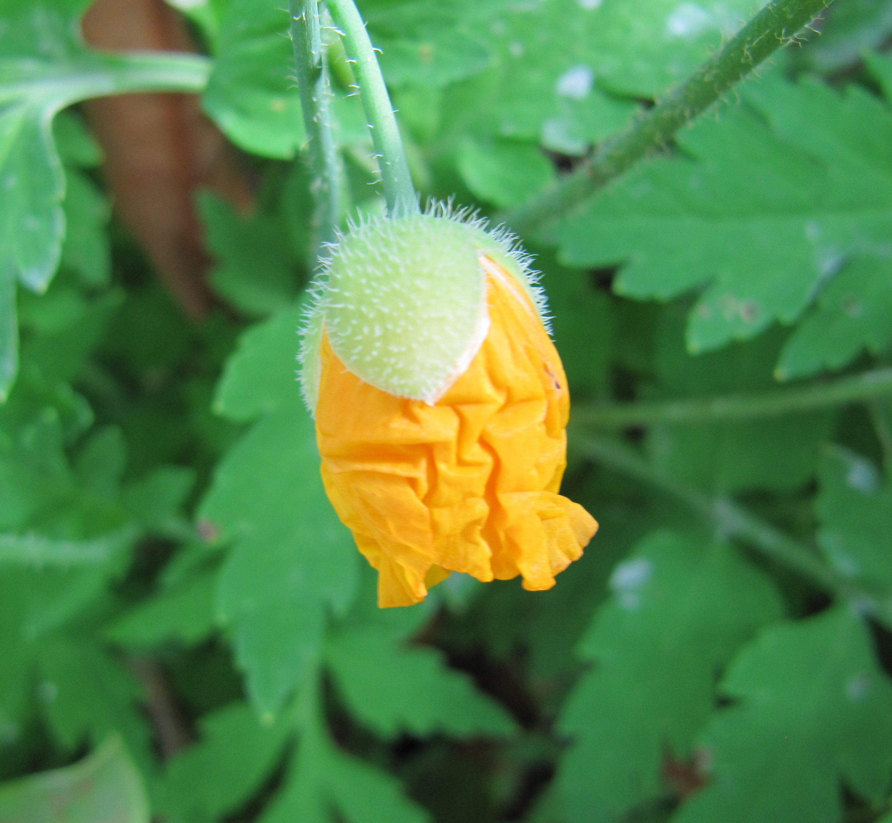 Fleur inconnue